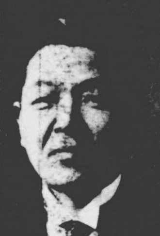 寿原英太郎（1882～1957）